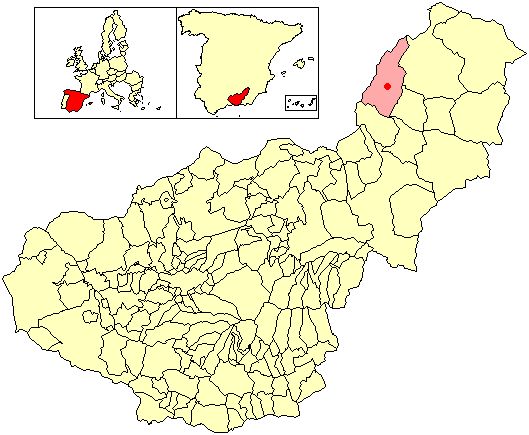 Situación del despoblado de Cuquillo (en el municipio de Castril) respecto a la provincia de Granada, en España.